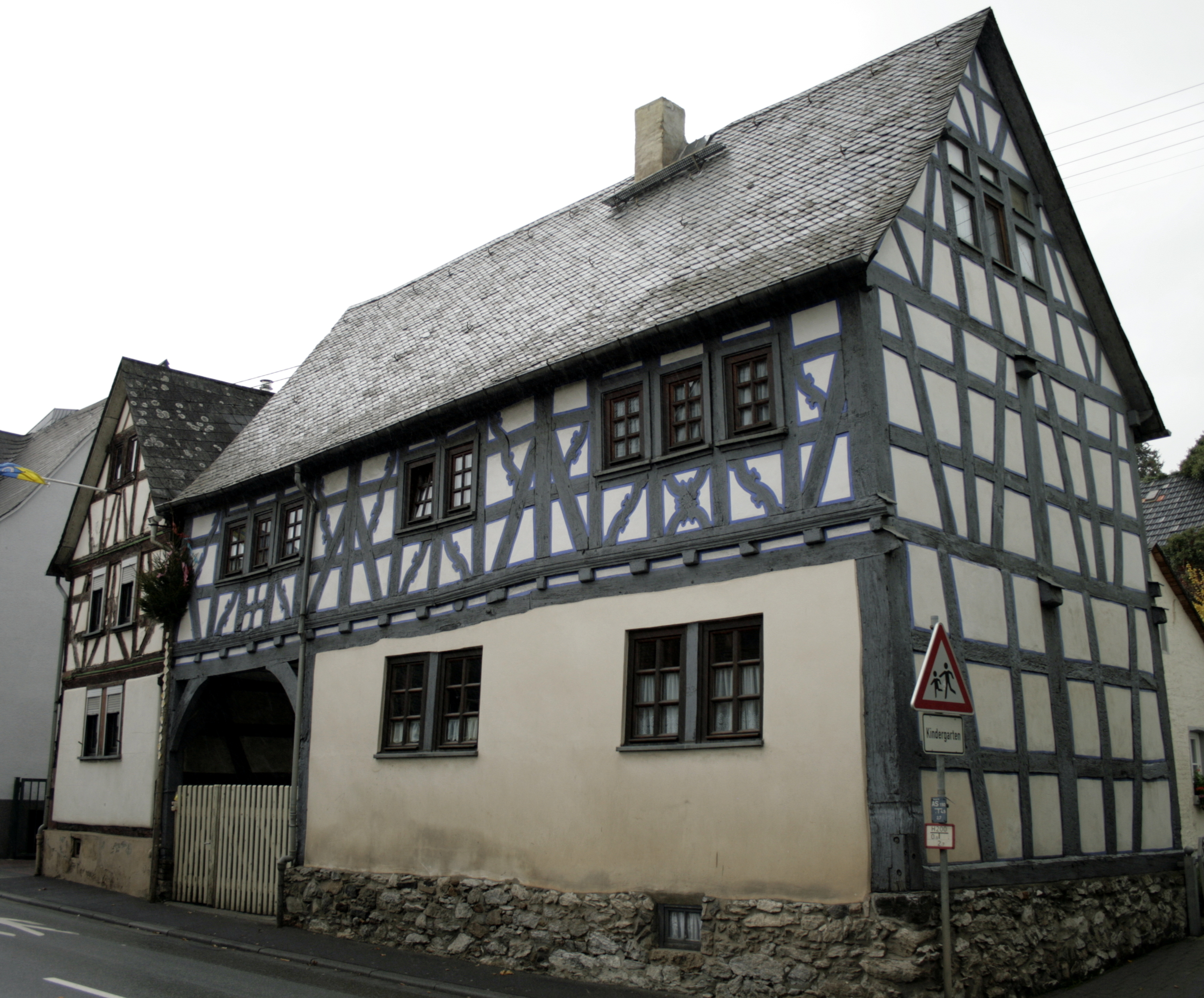 Fachwerkhaus aus der Zeit umm 1700 in Elz, Deutschland